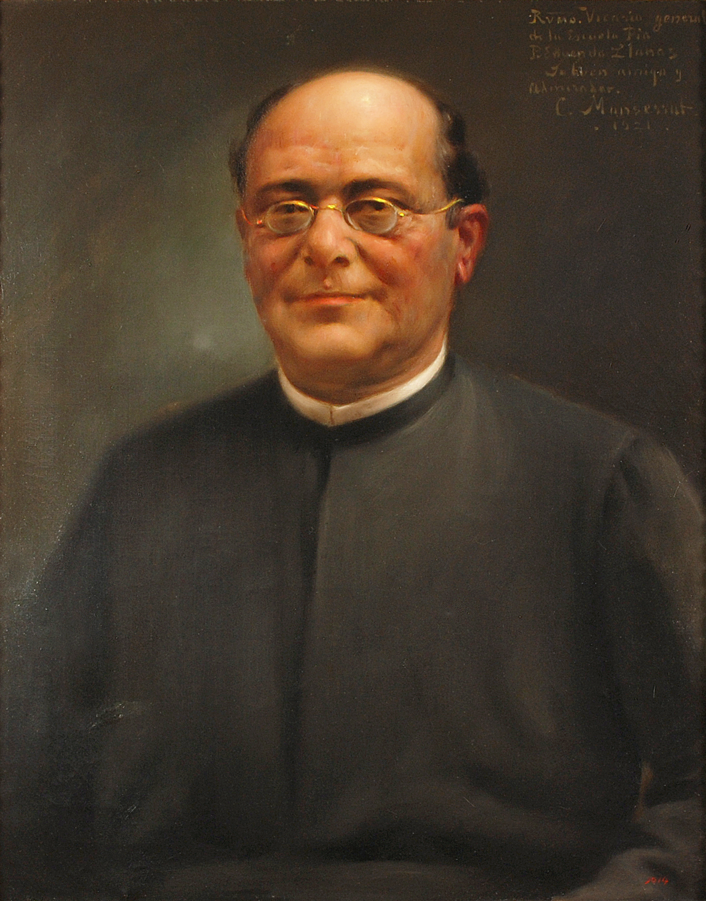 Retrat del P. Eduardo Llanas. pintura sobre tela. Biblioteca Museu Víctor Balaguer